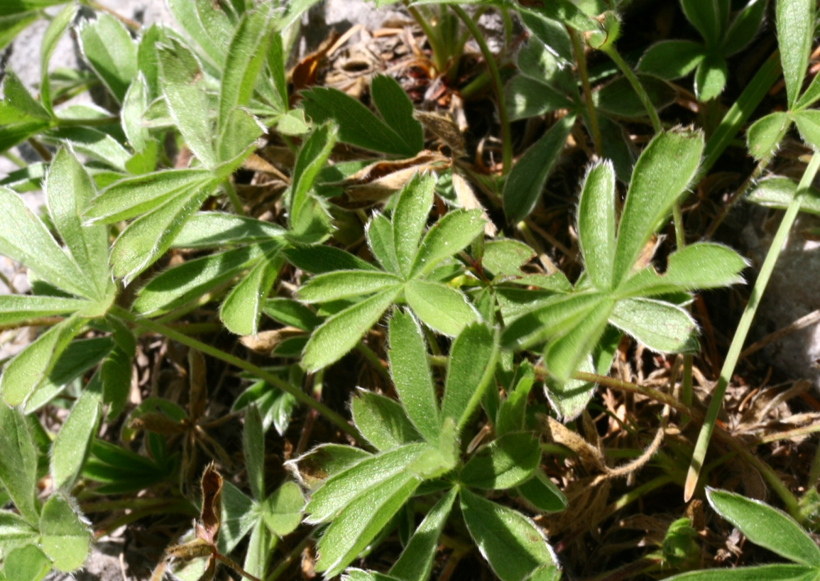 Potentilla_caulescens (Cinquefoglia penzola) Giardino Alpino Antonio Segni (loc. Rifugio Vazzoler) Taibon Agordino (BL), quota 1714 m s.l.m.